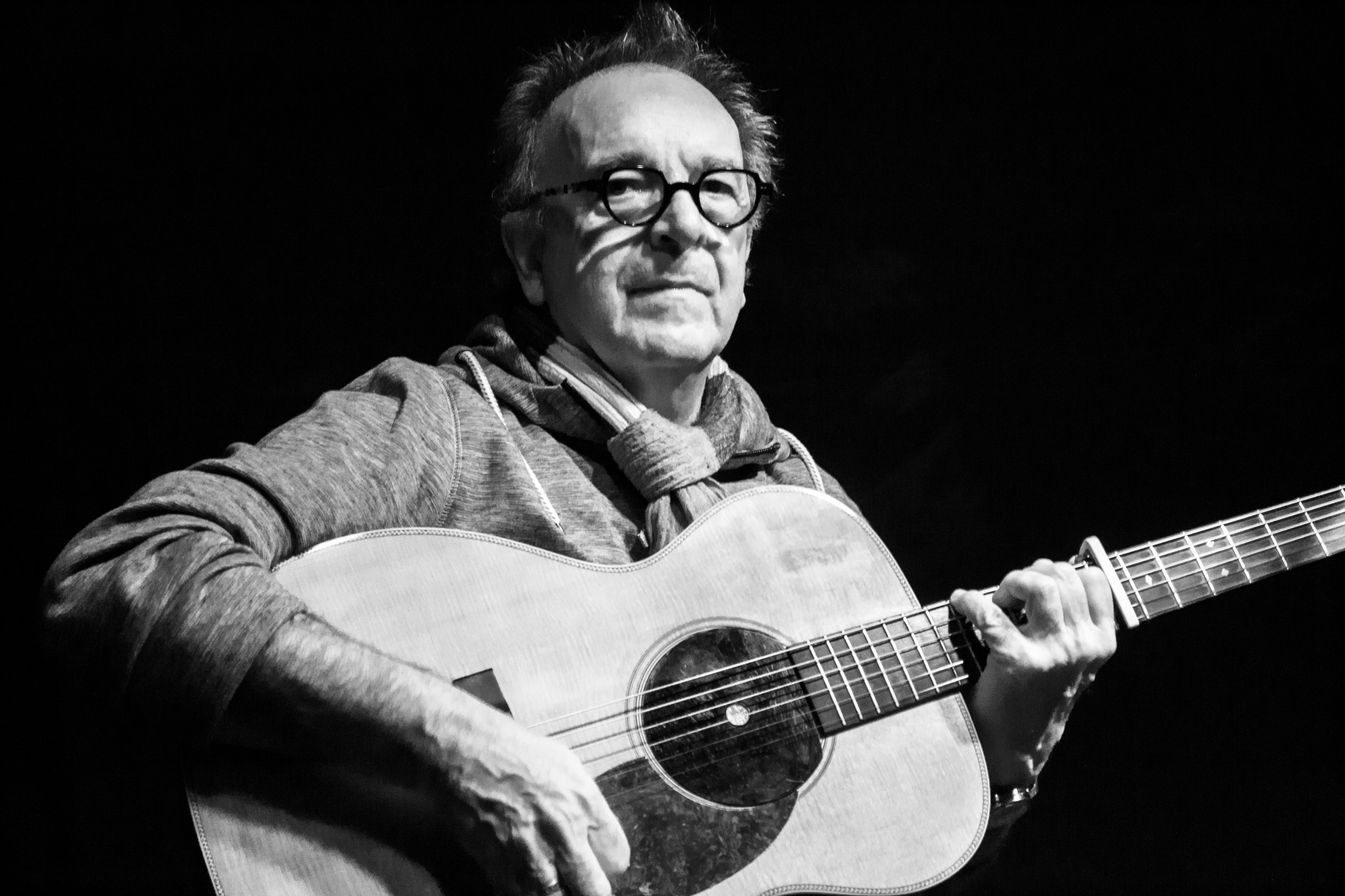 Fest-deiz et fest-noz du 5ème « Entre-deux Fest » organisé le 30 décembre 2016 à Poullaouen par Dañs-tro pour fêter les 26 ans de scène d'Annie Ebrel et Nolùen Le Buhé, célèbre duo de kan ha diskan.